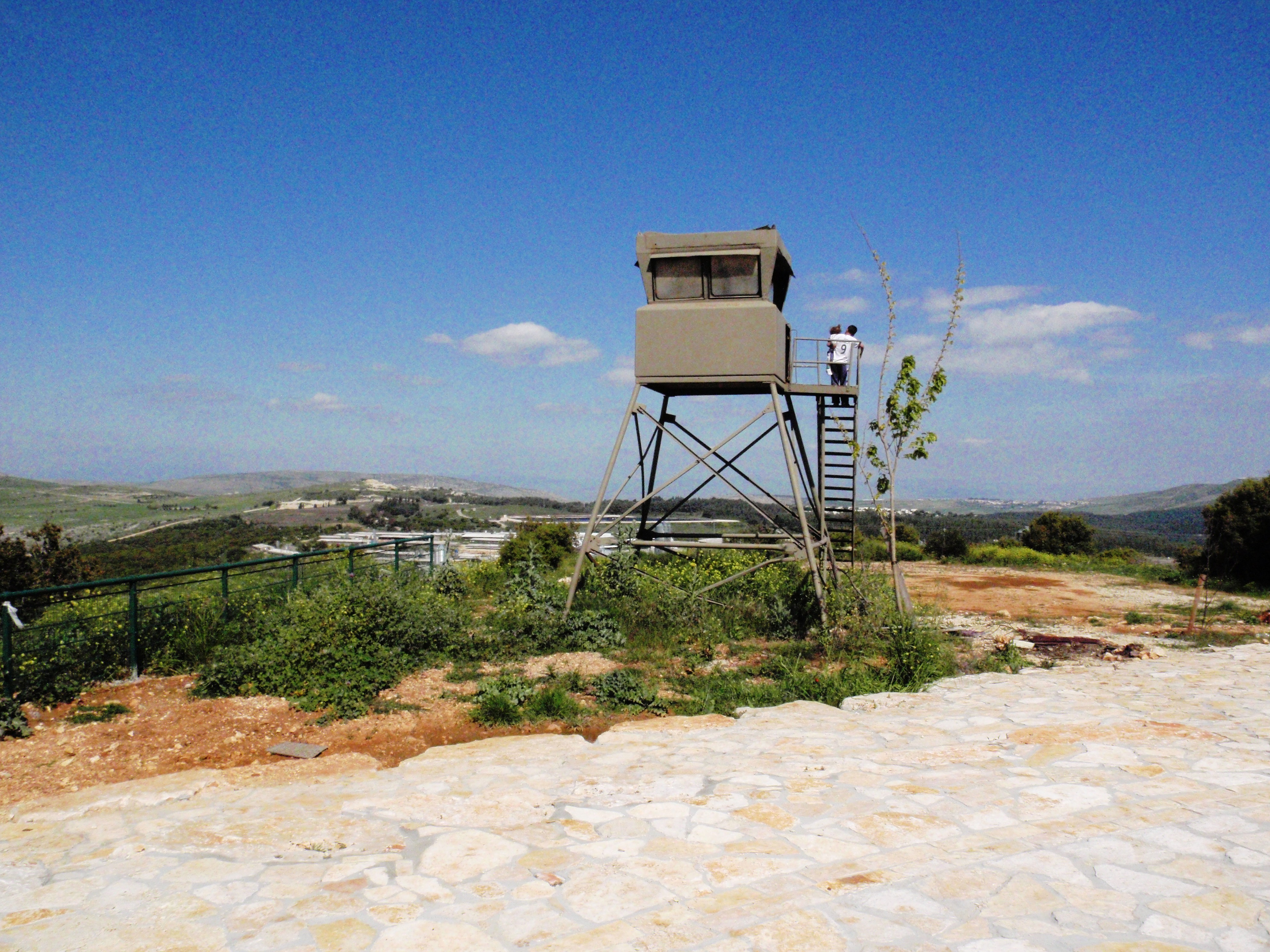 טיול פסח לגליל Pesach trip to the Galilee מגדל התצפית בכפר התיירותי דובב